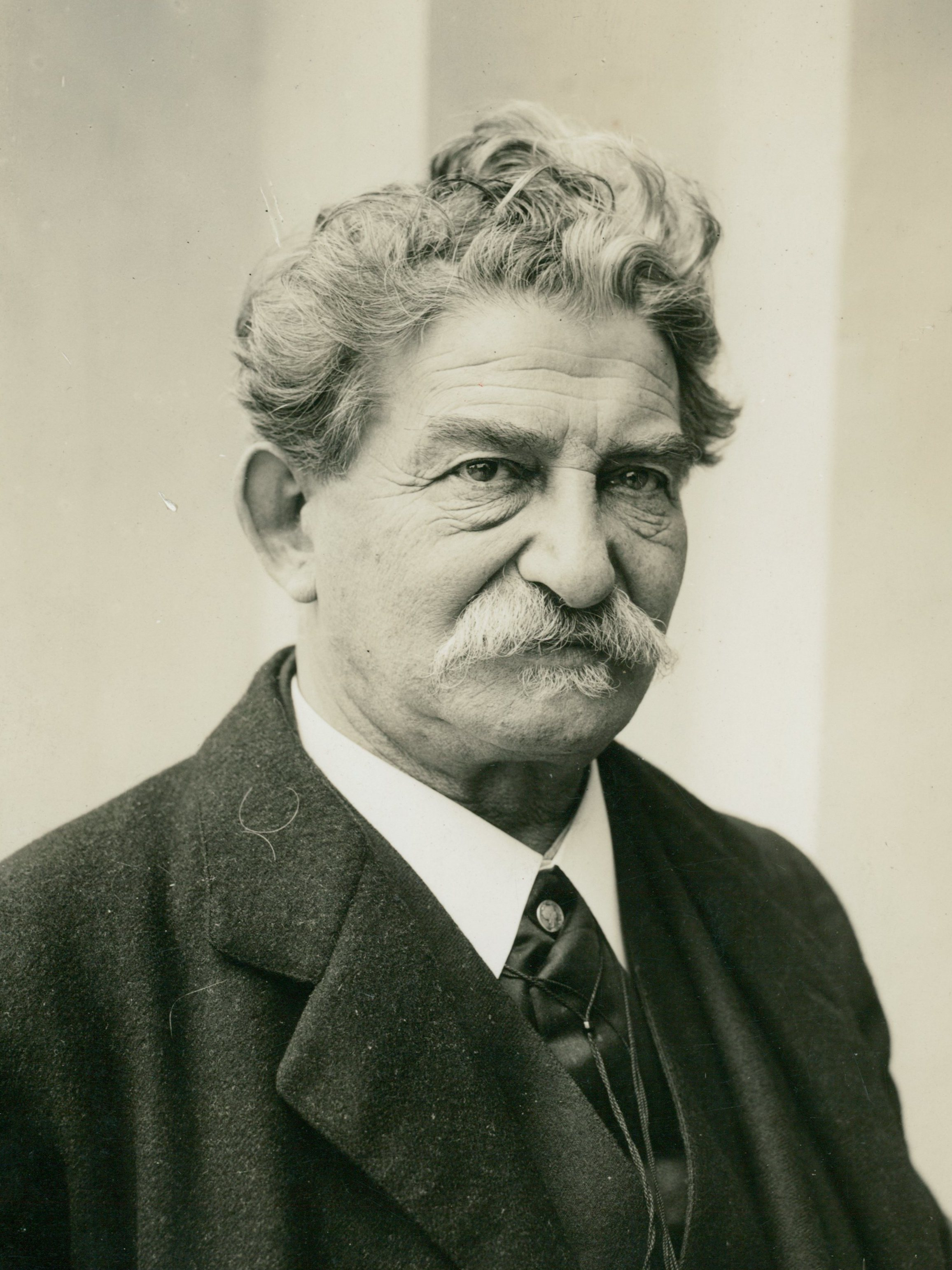 Aleksander Sochaczewski, ok. 1913 r.